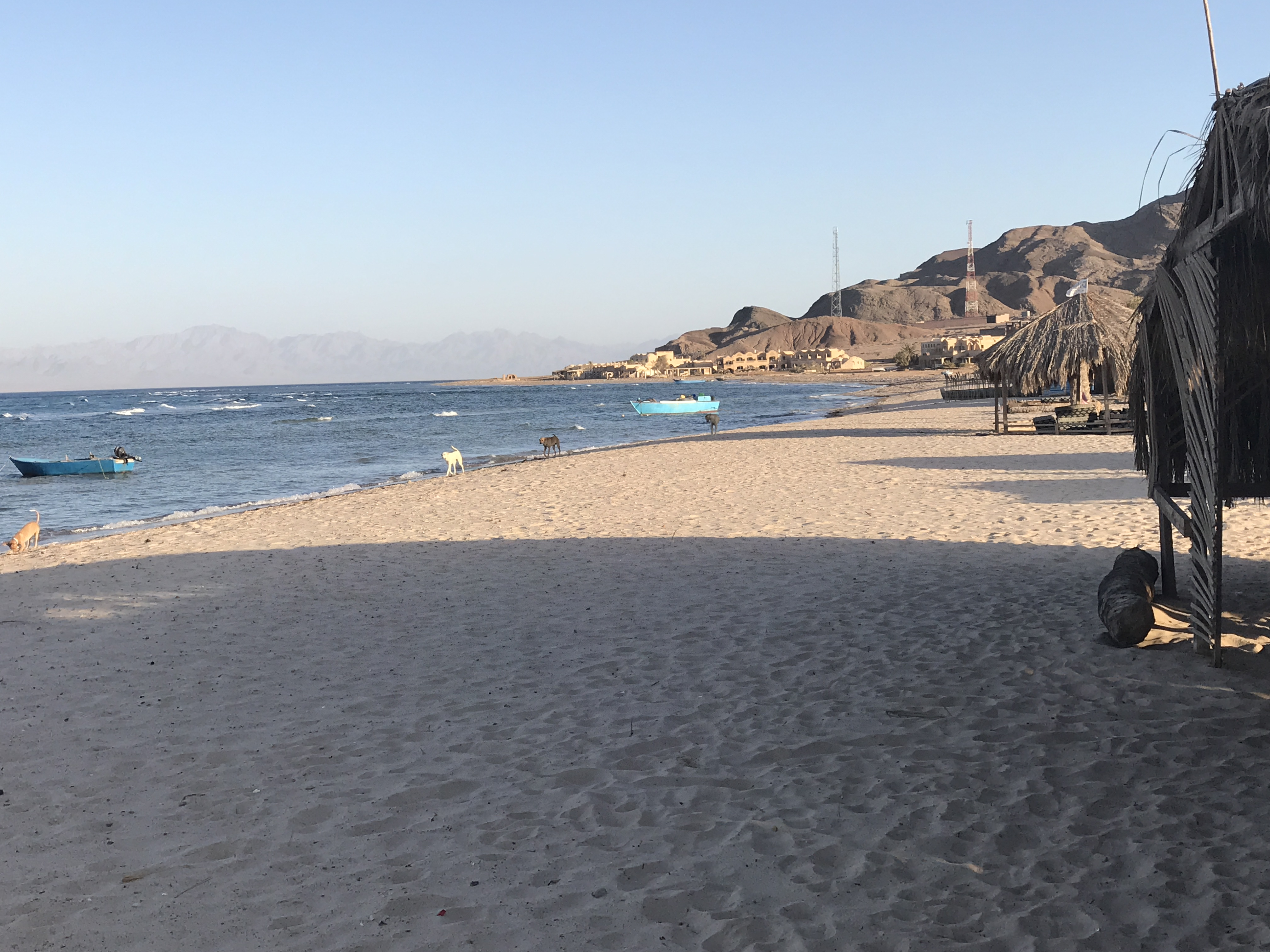 חוף מיאמי בביר סוויר - מצפון לדרום